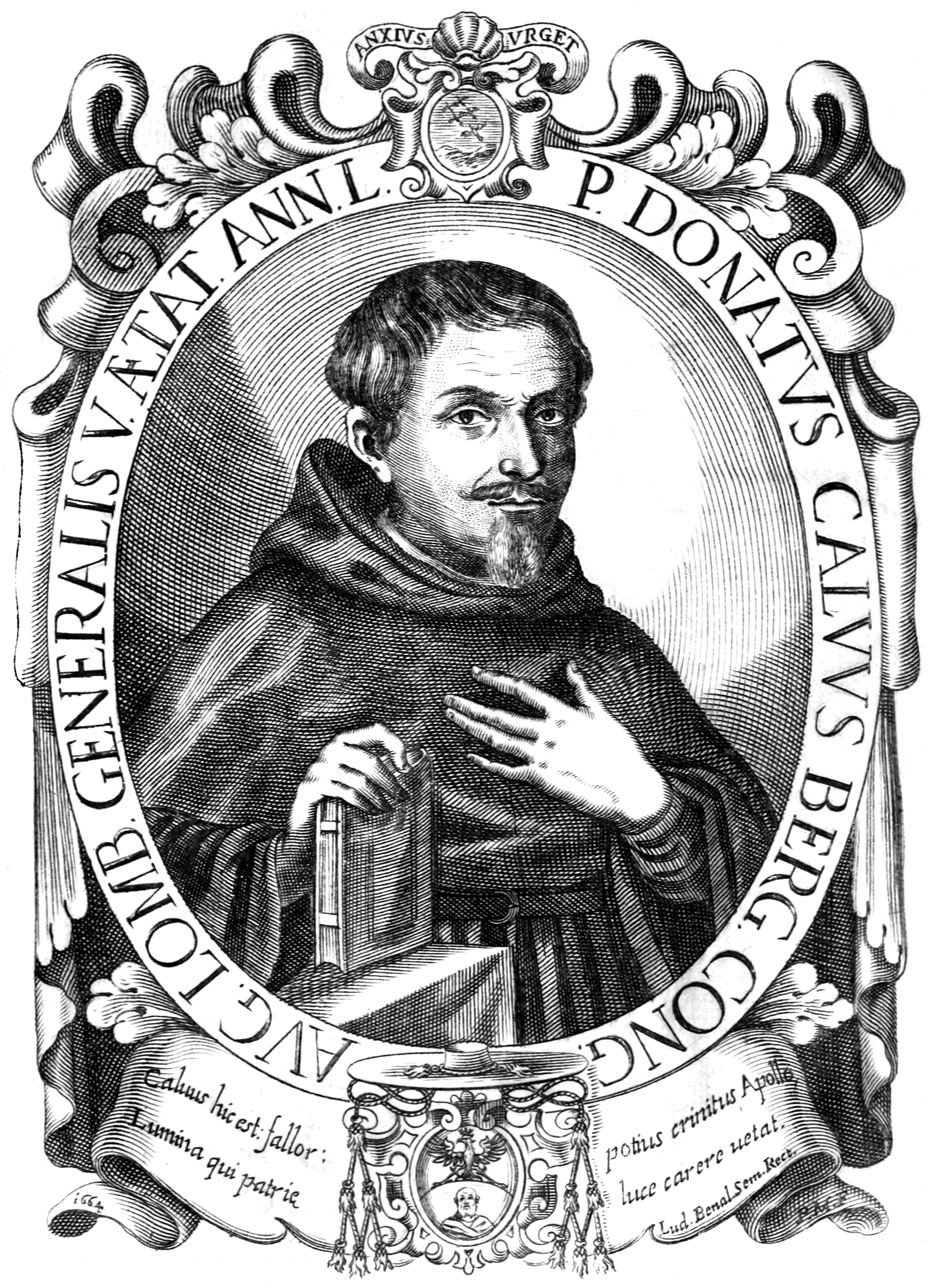 Incisione del 1664 raffigurante Donato Calvi